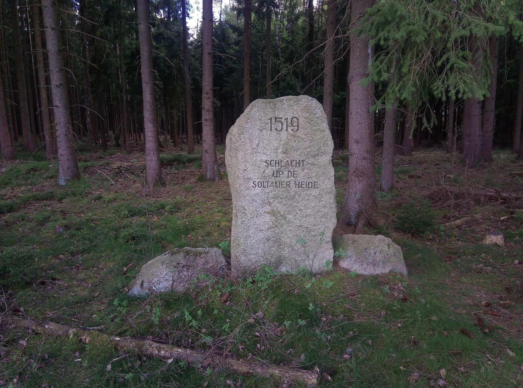 Gedenkstein am Ort der Schlacht bei Soltau im Jahre 1519